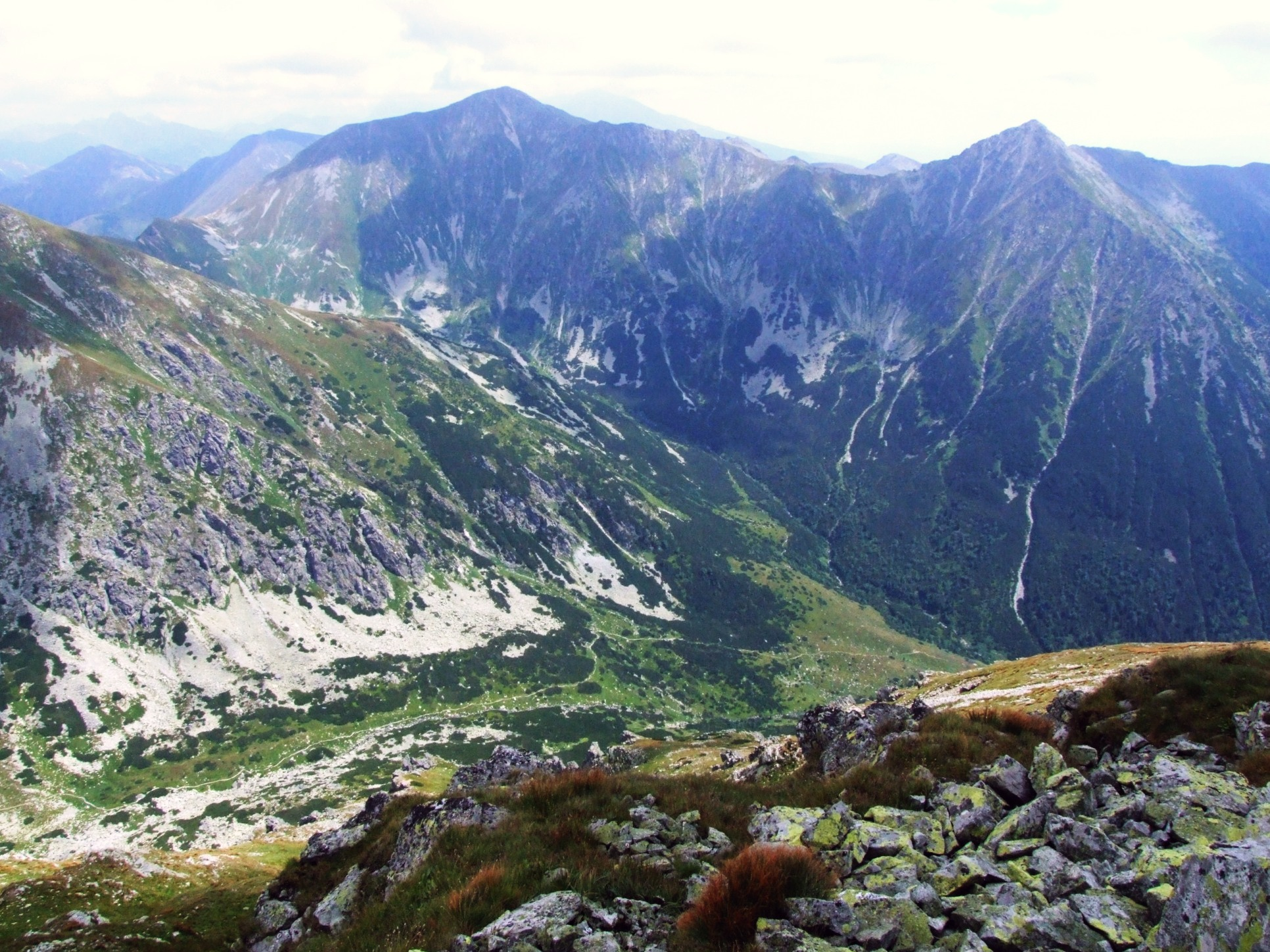 Grań Bystrej,Ráčkova dolina i Gáborova. Widok z Jakubiny